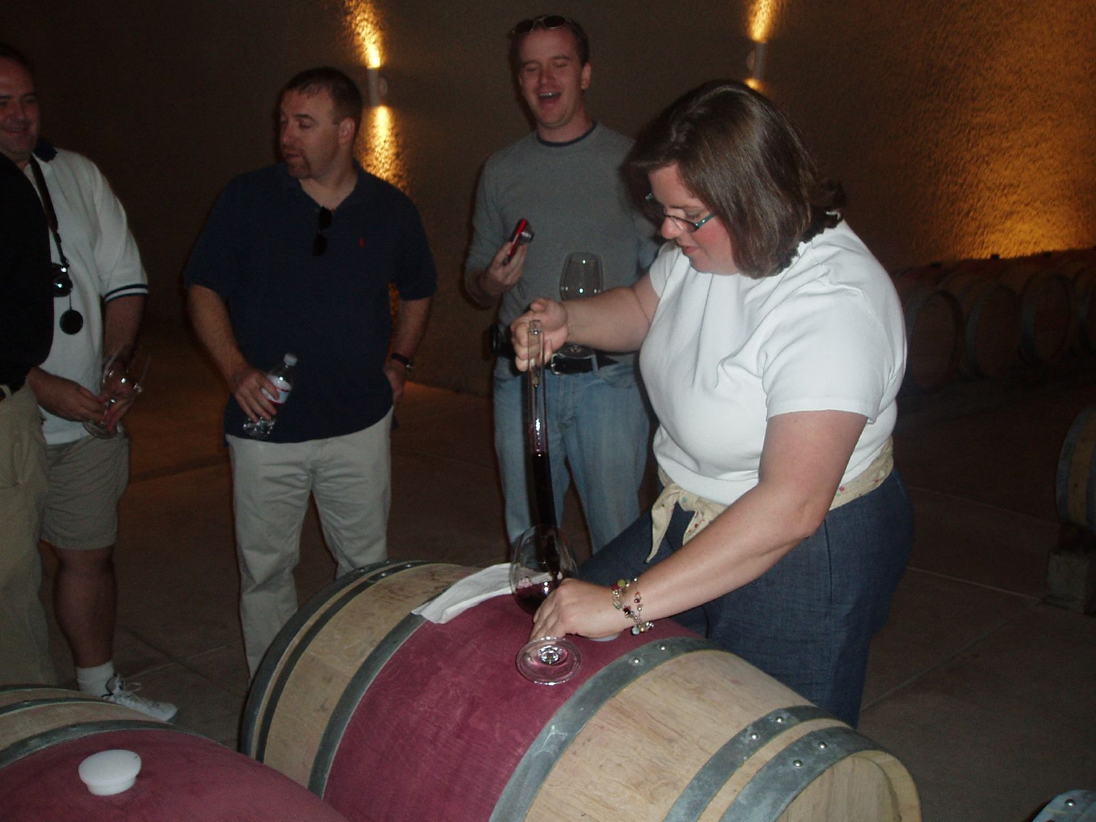 Wine barrel sampling